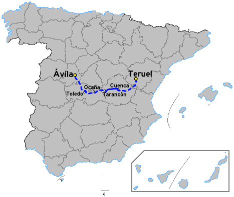 mapa de la autovía española a40